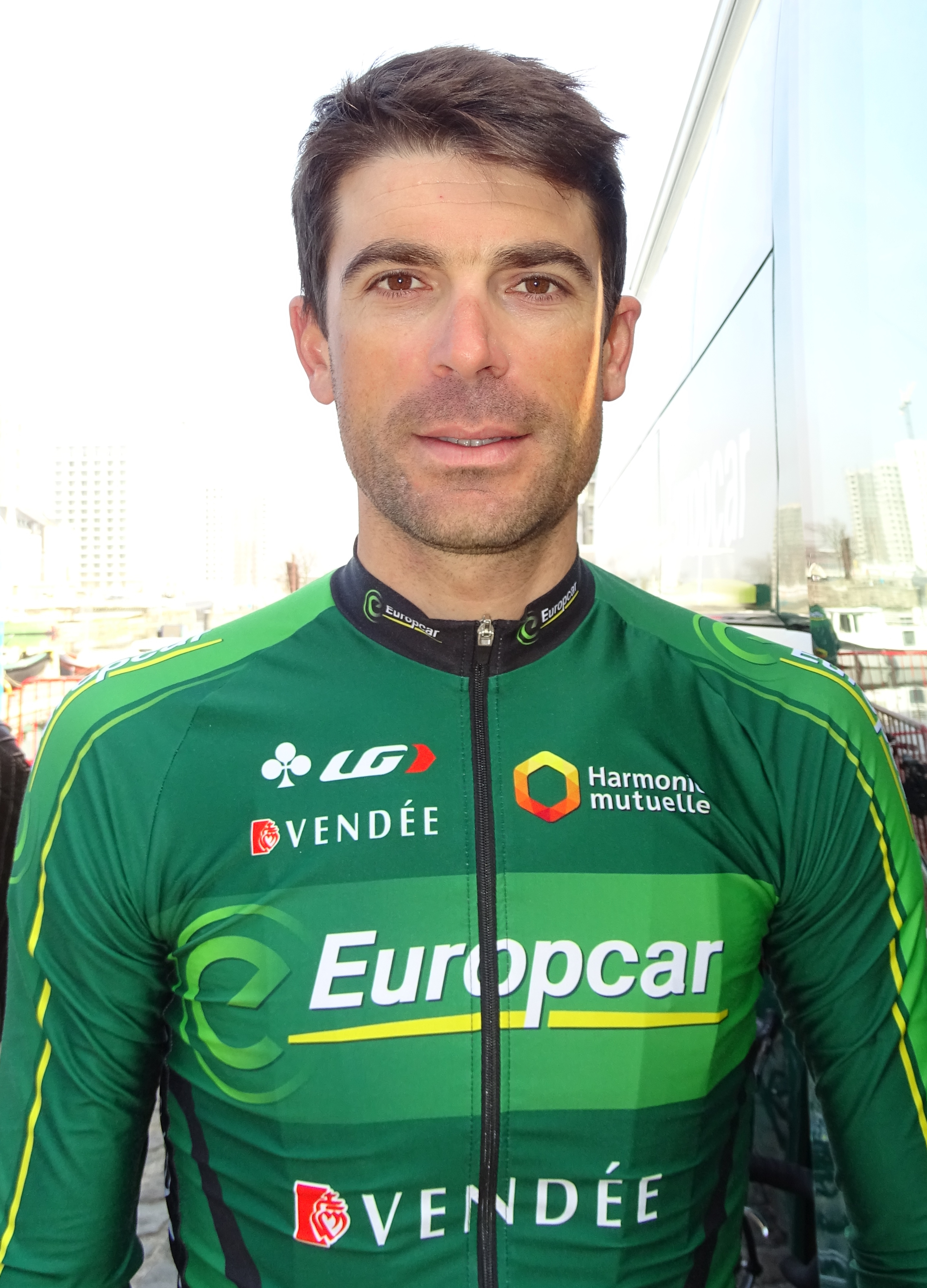 Reportage réalisé le mercredi 8 avril à l'occasion du départ du Grand Prix de l'Escaut 2015 à Anvers, Belgique.